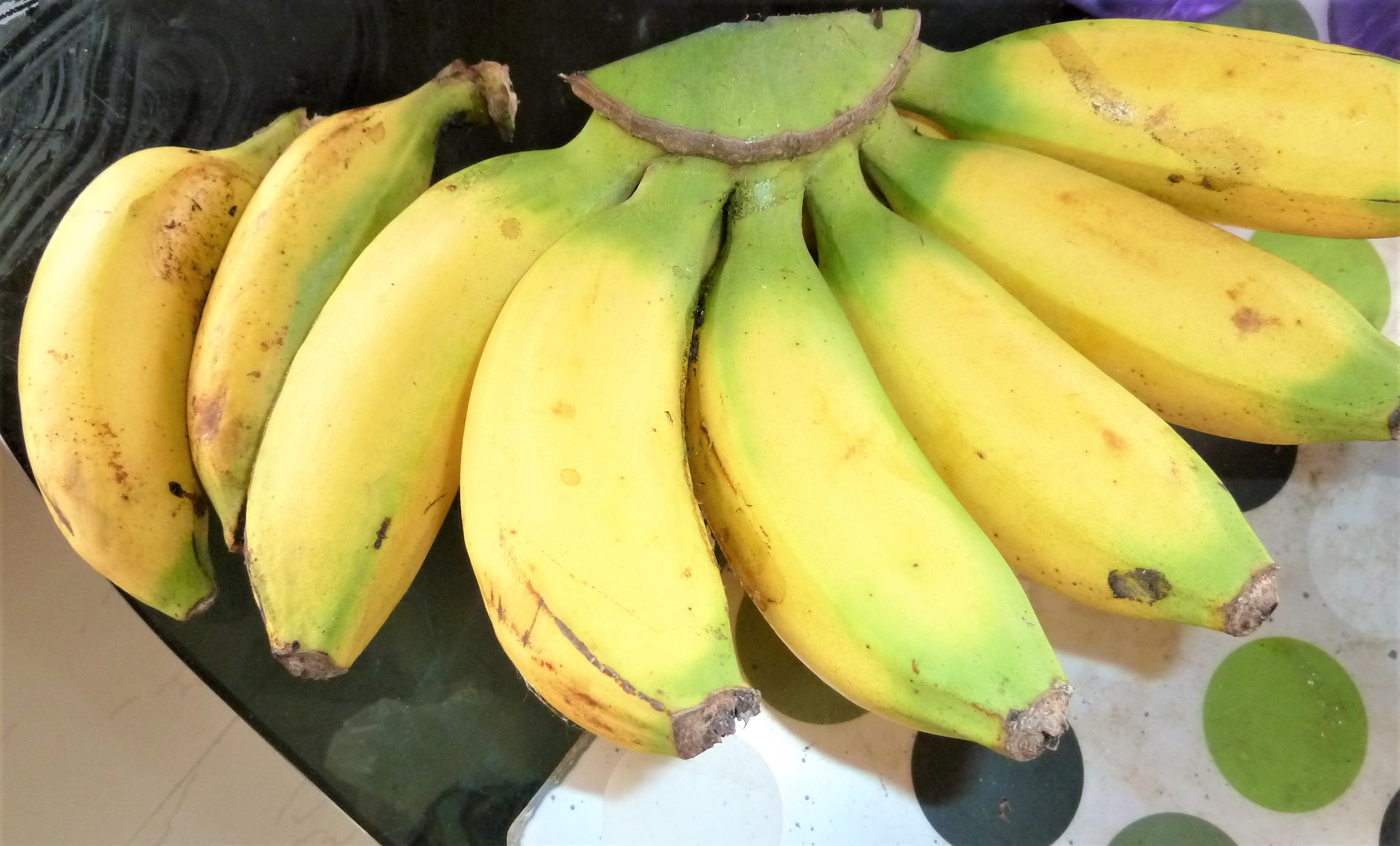 చక్రకేళీ